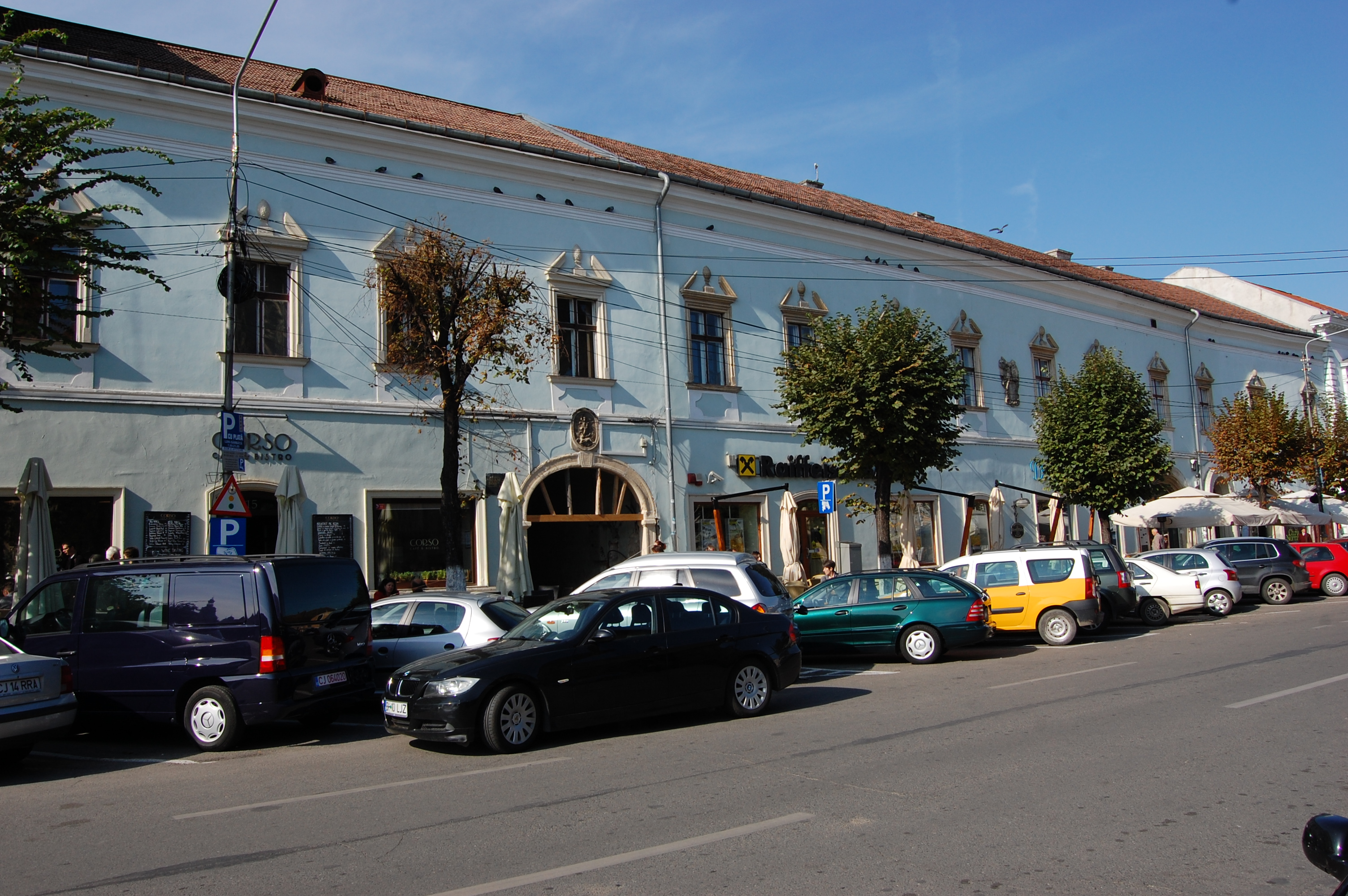 Cluj,Casă, Piata Unirii 15-16 Parohia Bisericii Catolice